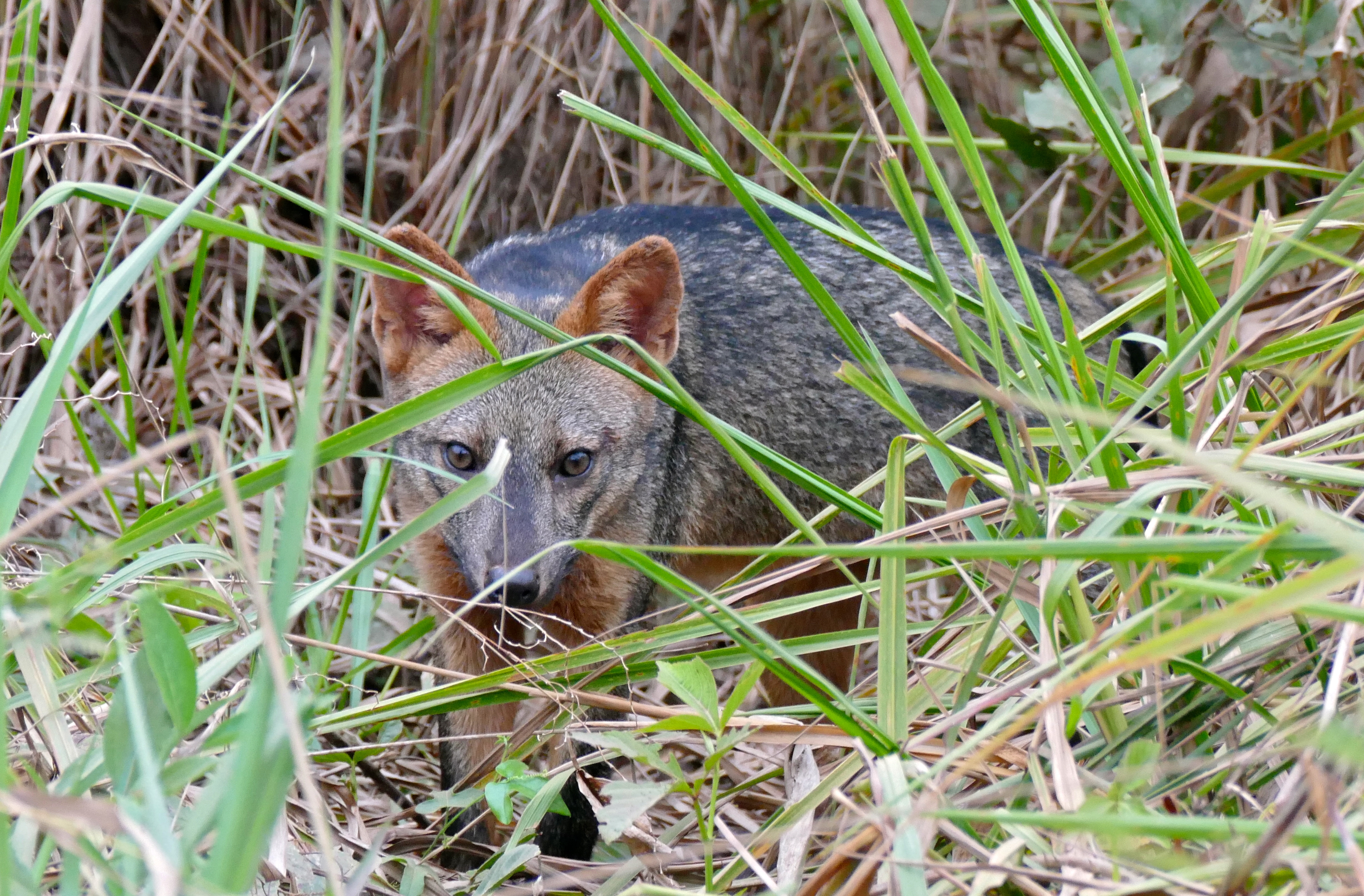 Transpantaneira, Poconé, Mato Grosso, BRAZIL